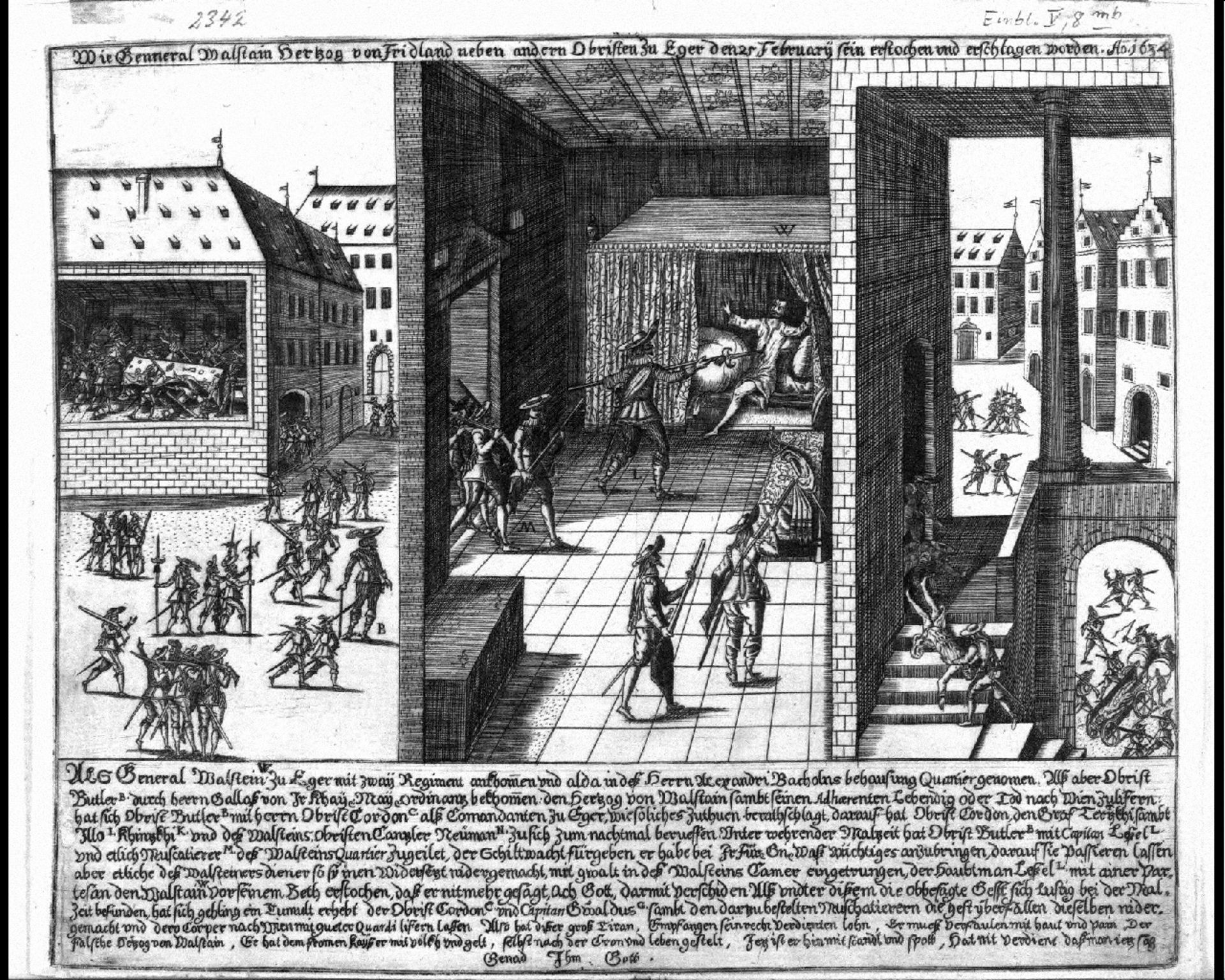 Flugblatt zur Ermorderung Wallensteins